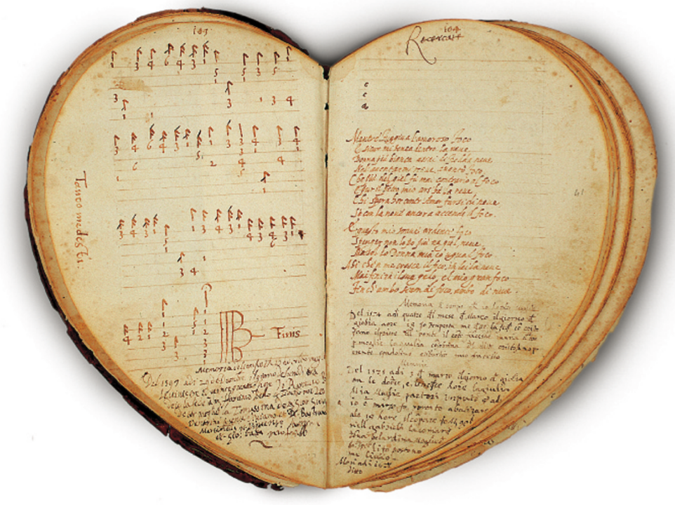 Manuscrit de Pesaro, Biblioteca Oliveriana, ms. 1144 (XVIe siècle). Il contient un répertoire pour la Lira da braccio .